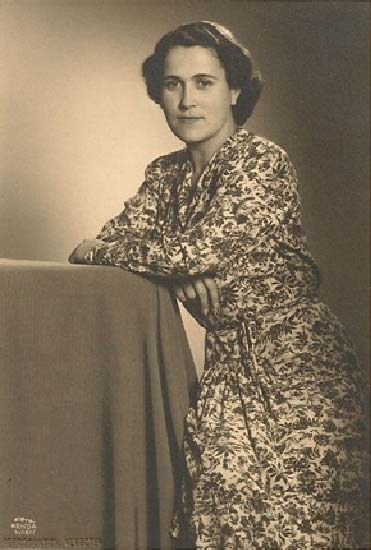 Marie Adelaide of Braganca, infanta of Portugal (1912-2012), daughter of Miguel, Duke of Braganza and his wife Princess Maria Theresa of Löwenstein-Wertheim-Rosenberg.